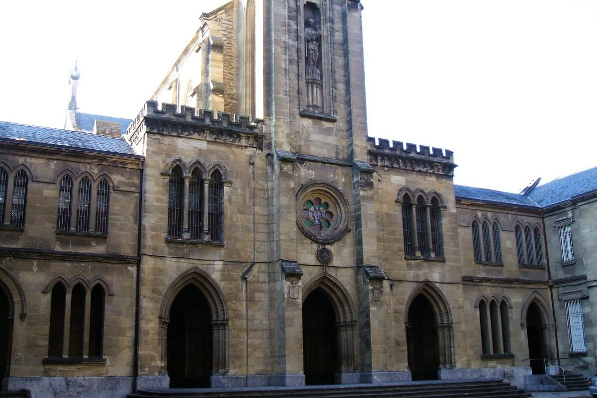 Iglesia neogótica del Convento de las Salesas, Vitoria-Gasteiz, País Vasco, España/Spain